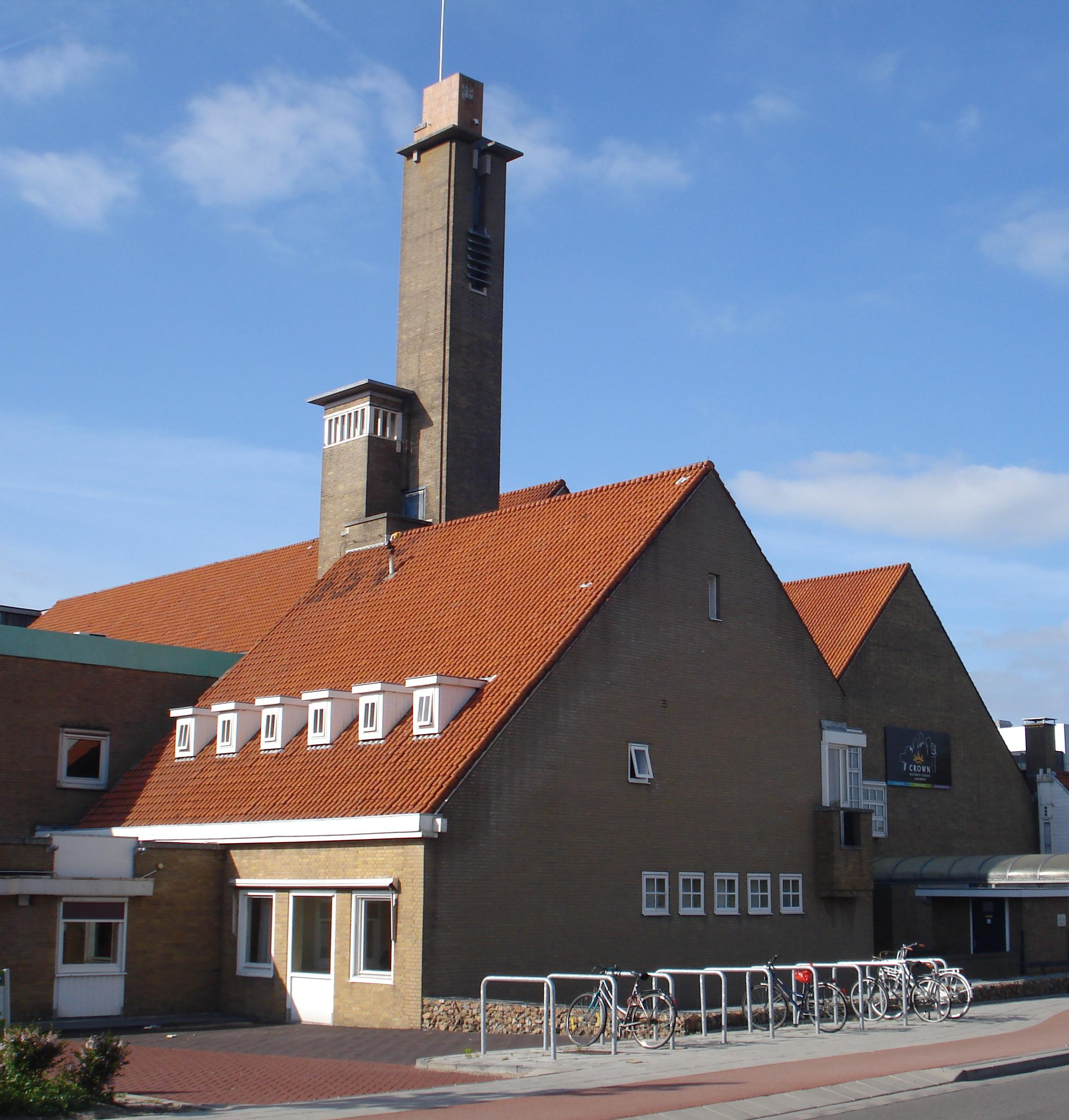 Aalsmeer: ingang oude veilinggebouw